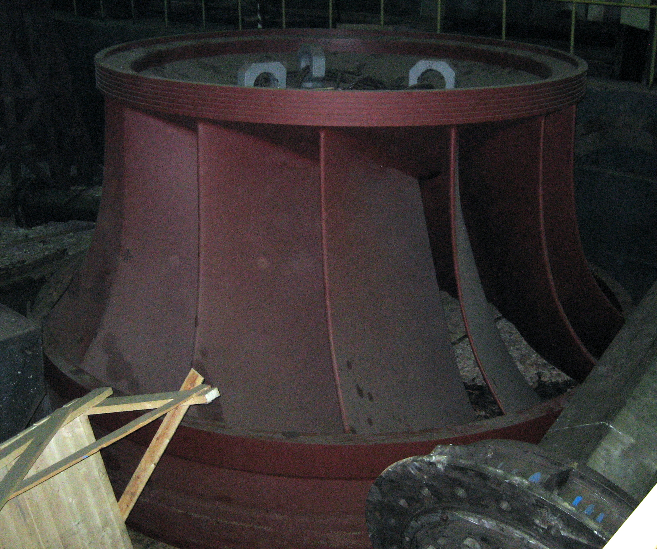 Рабочее колесо турбины Камбаратинской ГЭС-2